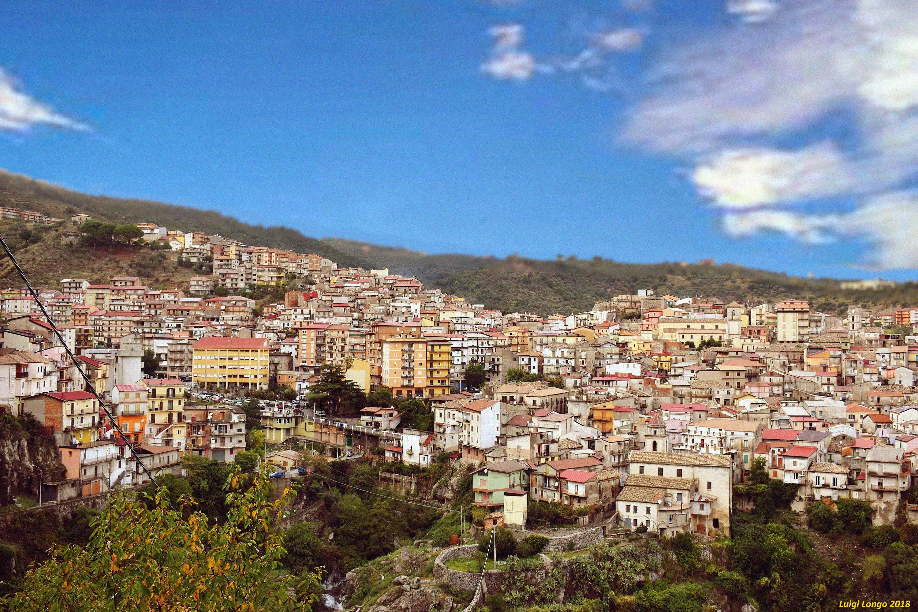 meso 2018